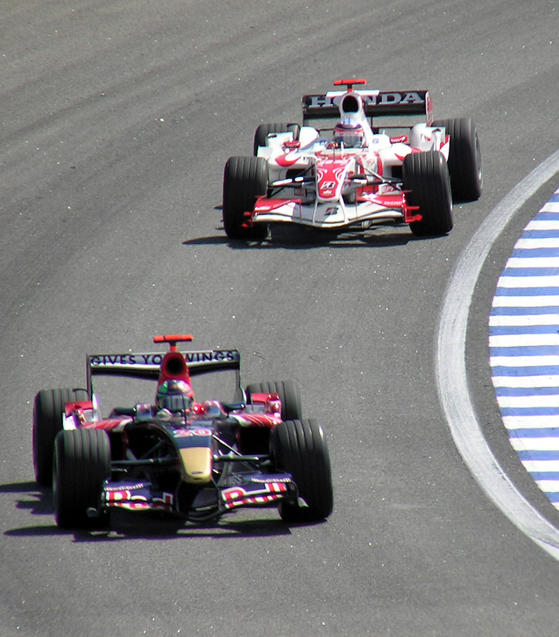 Formula One 2006 Rd.18 Interlagos: Takuma Sato (Super Aguri) chasing Vitantonio Liuzzi (Toro Rosso)